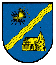 Coat of arms Kirchtimke, Wappen der Gemeinde Kirchtimke